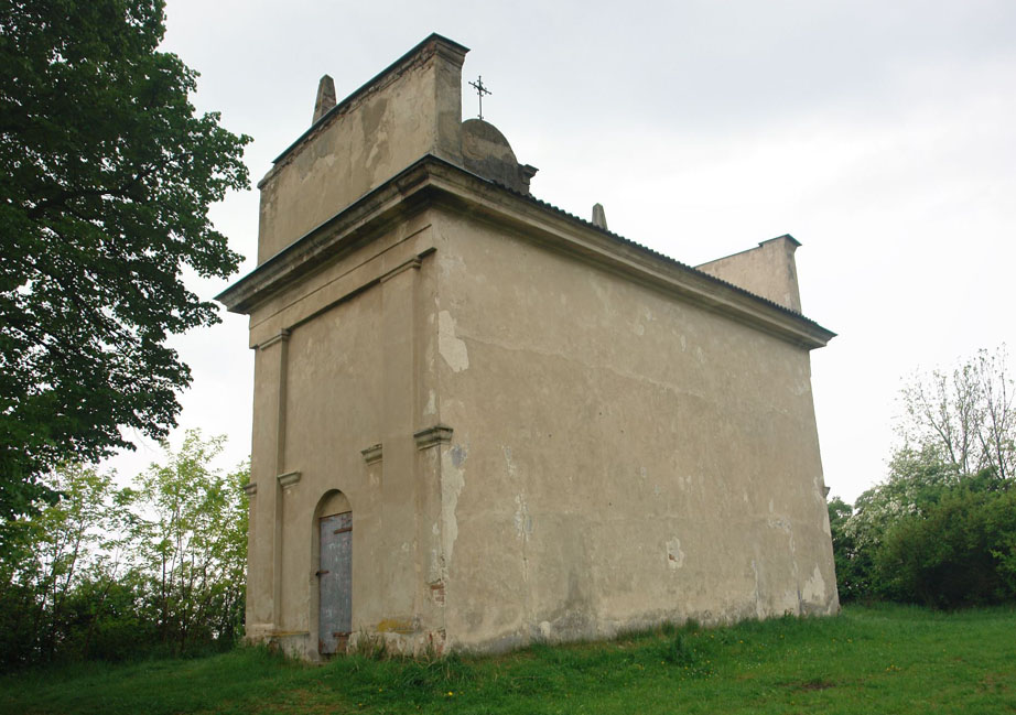 Loretánská kaple, gloriet, Žitenice.